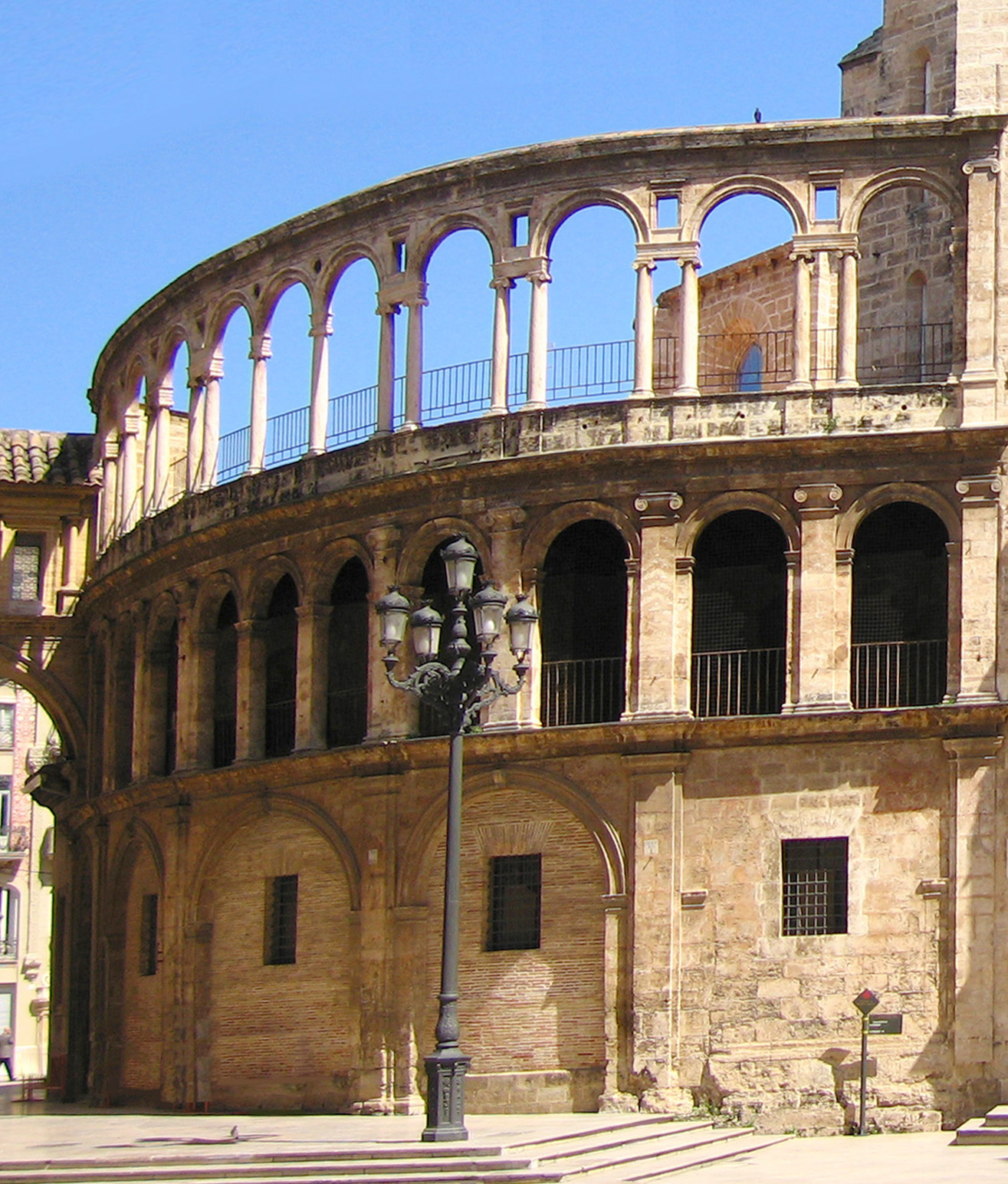 Obra Nova seu de València